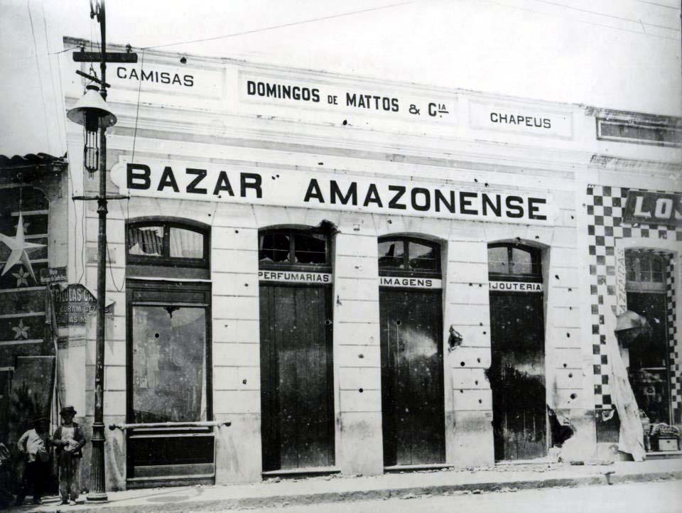 Estado do Bazar ao final da tarde de 8 de outubro de 1910